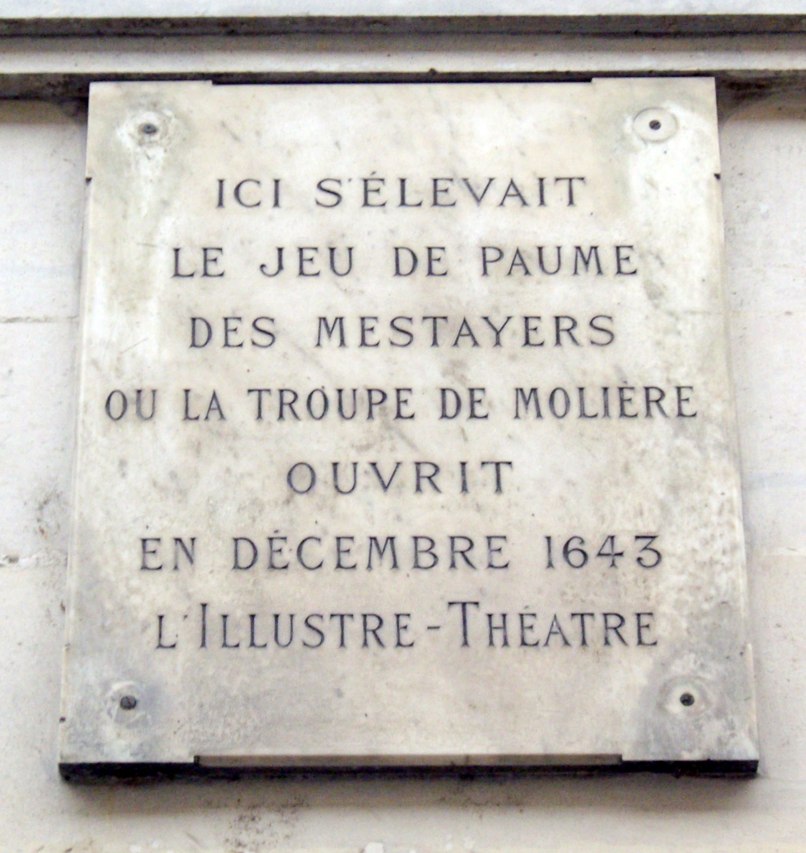 Plaque apposée au n° 12 de la rue Mazarine, Paris 6e. « Ici s'élevait le Jeu de paume des Mestayers où la troupe de Molière ouvrit en décembre 1643 l'Illustre-Théâtre. »